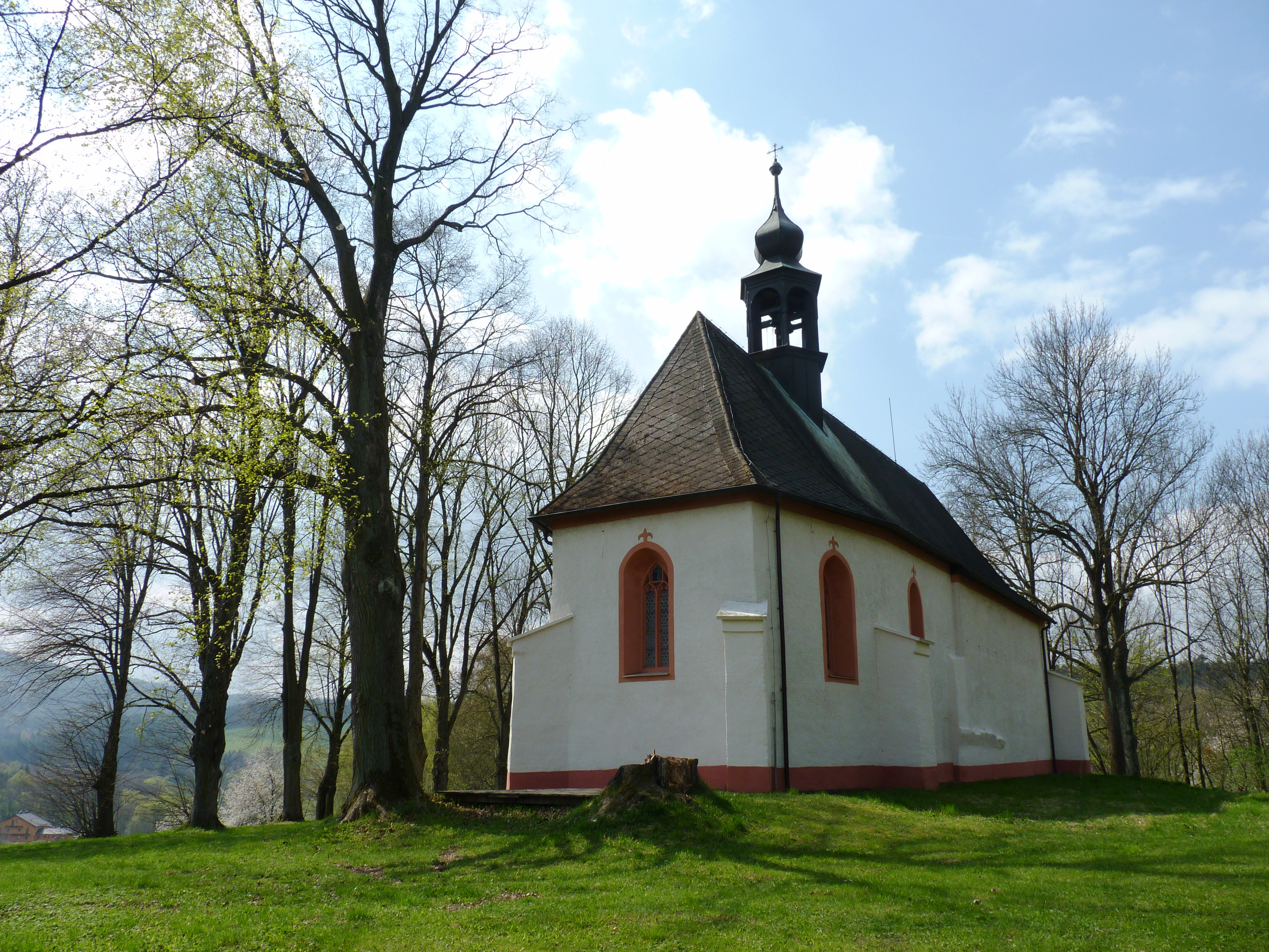 Kostel sv. Linharta v Uhlišti.